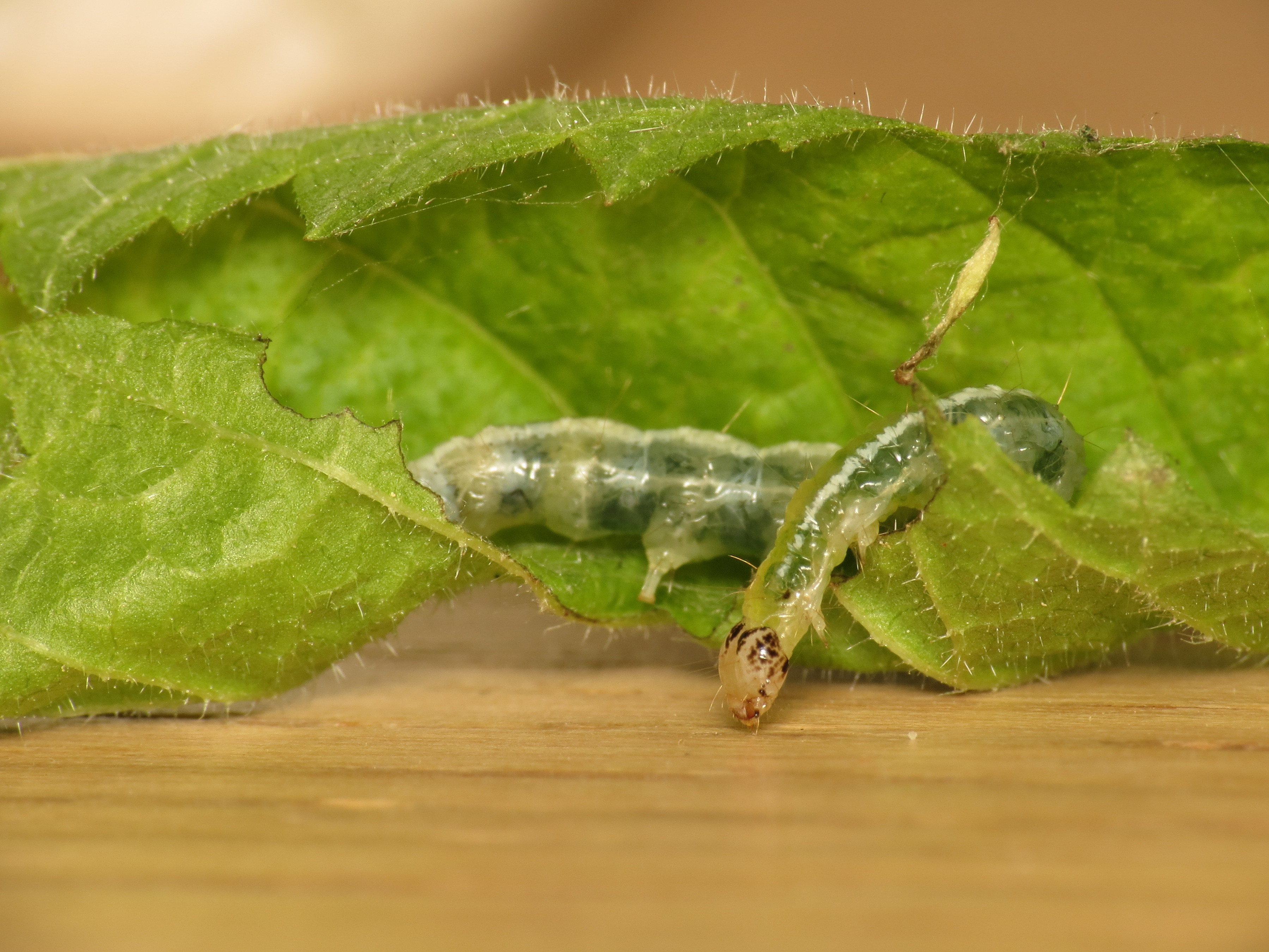 Udea prunalis ([Denis & Schiffermüller], 1775), larva on Ulmus glabra Huds., Søborg, Denmark, 17 May 2014